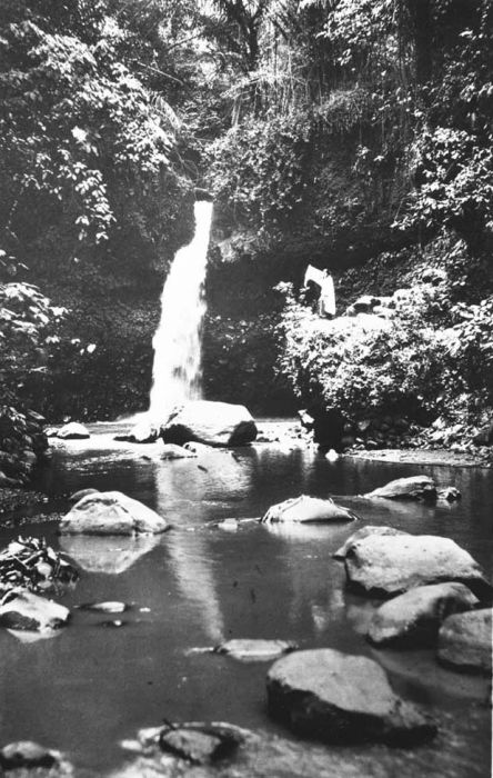 Foto. Waterval bij Dago, West-Java